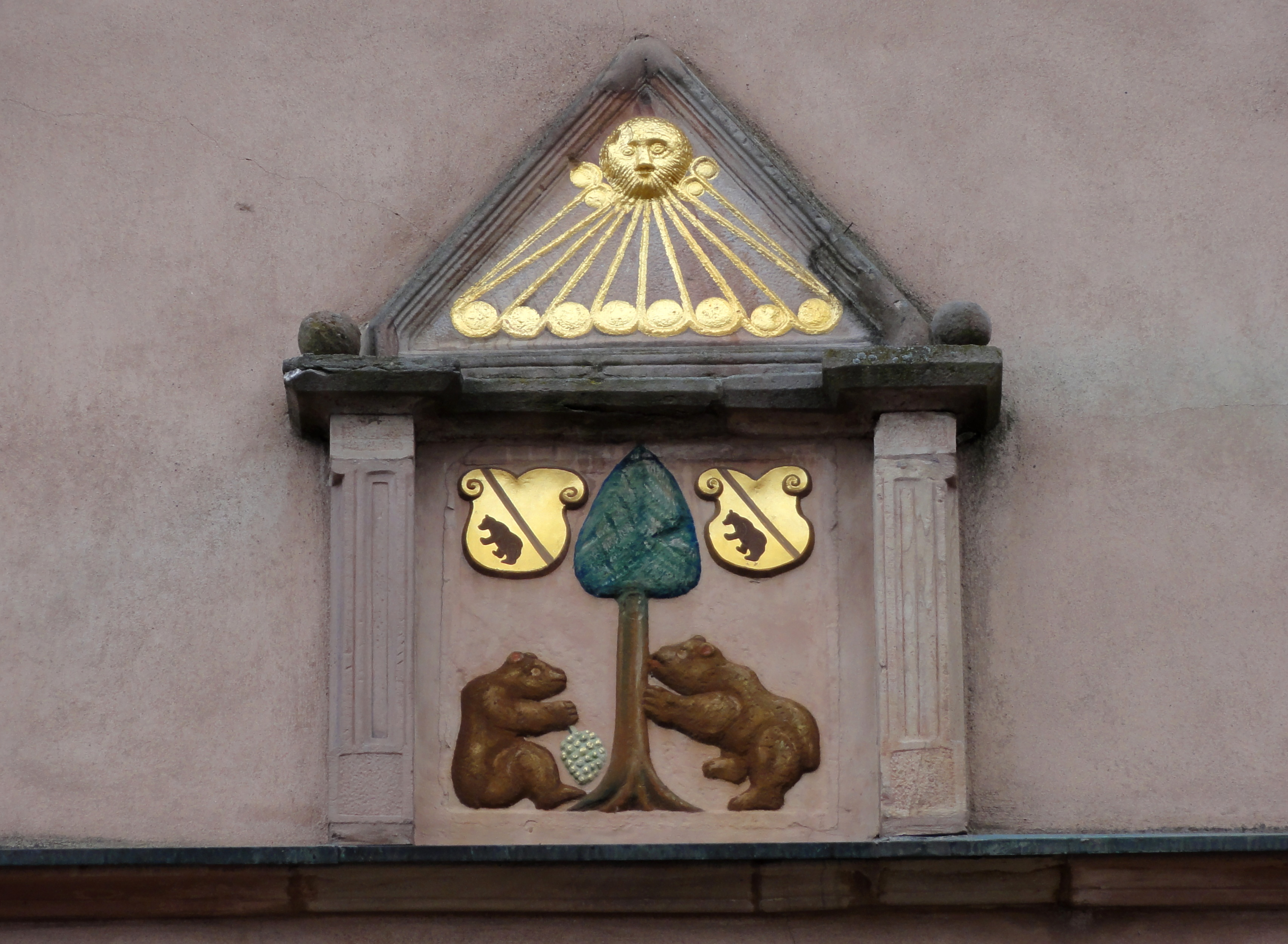 Alsace, Bas-Rhin, Hôtel de Ville de Dambach-la-Ville (1547), 11 place du Marché (PA00084681, IA00115189).